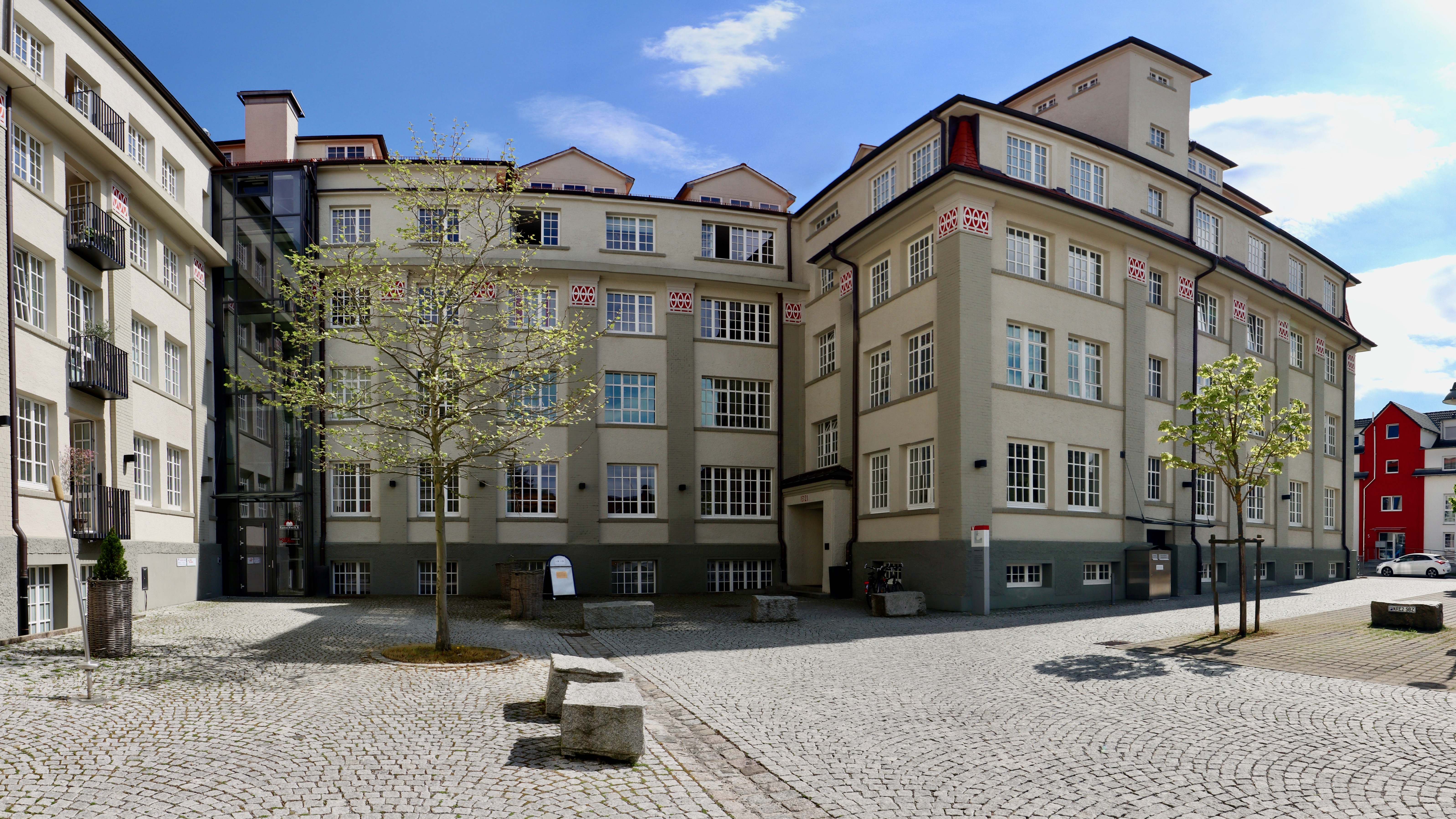 Vorderansicht Bau V im Hohner Areal